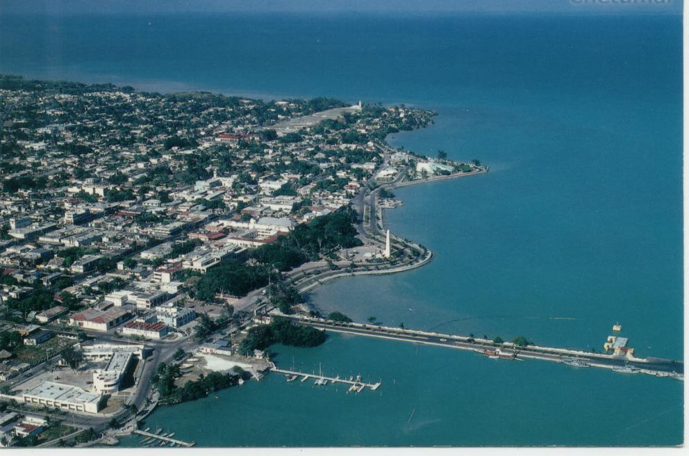 Vista aérea de la ciudad de Chetumal, Quintana Roo, Mexico